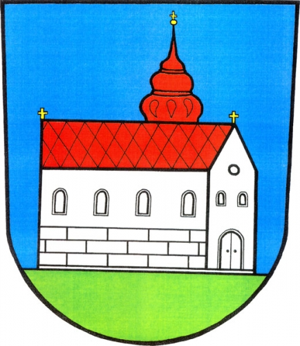 Znak, Nový Malín, okres Šumperk